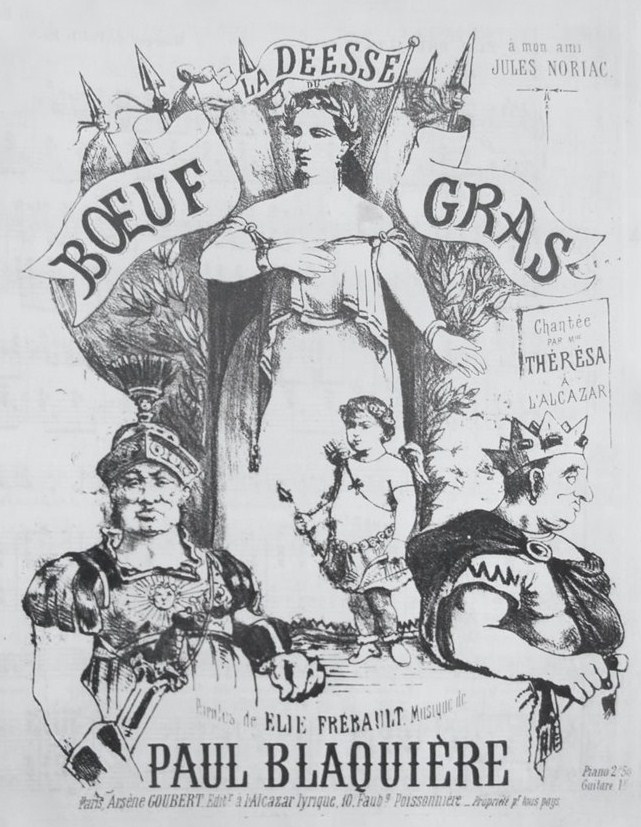 Couverture d'une partition de chanson.